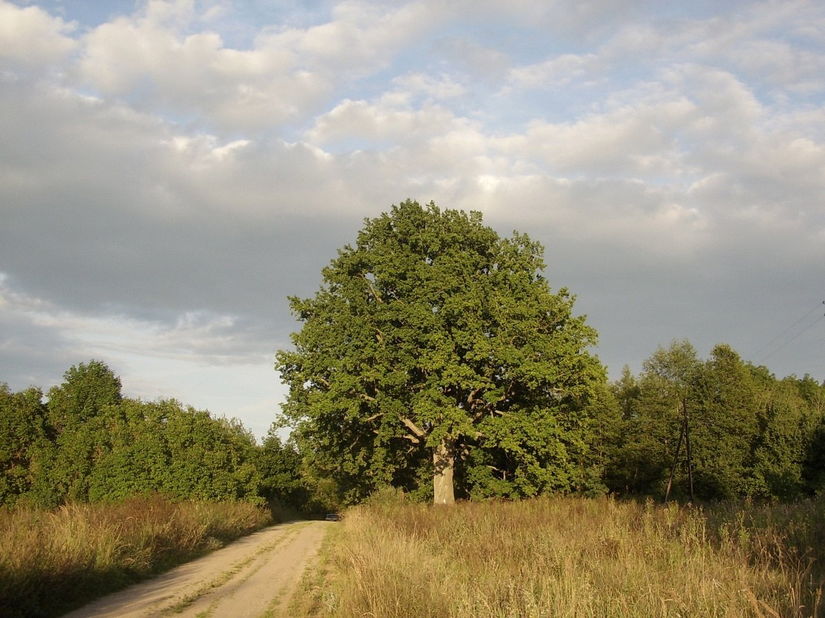 Тадуліна. Цар-дуб